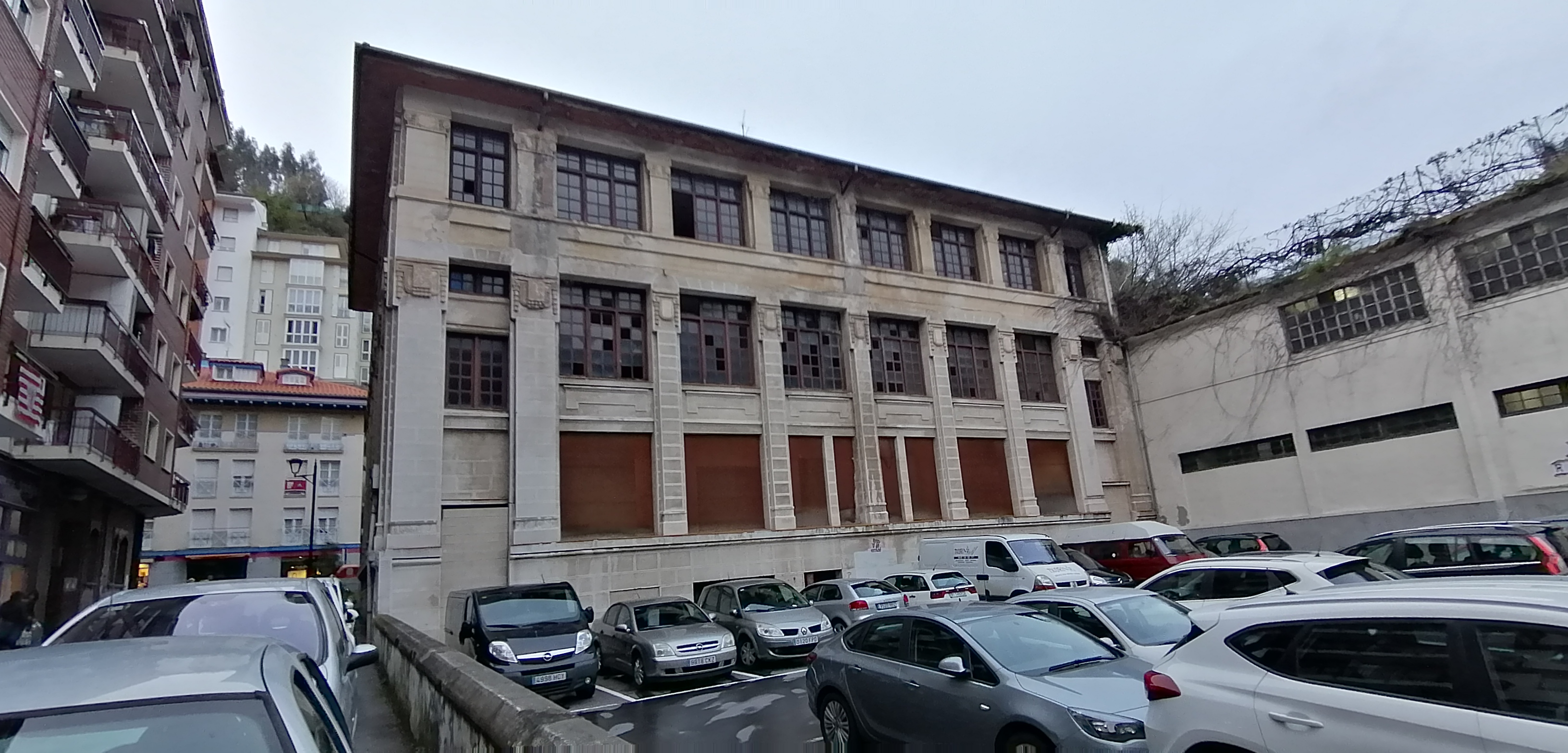 Zeledonio Arriola eskola Ondarroan